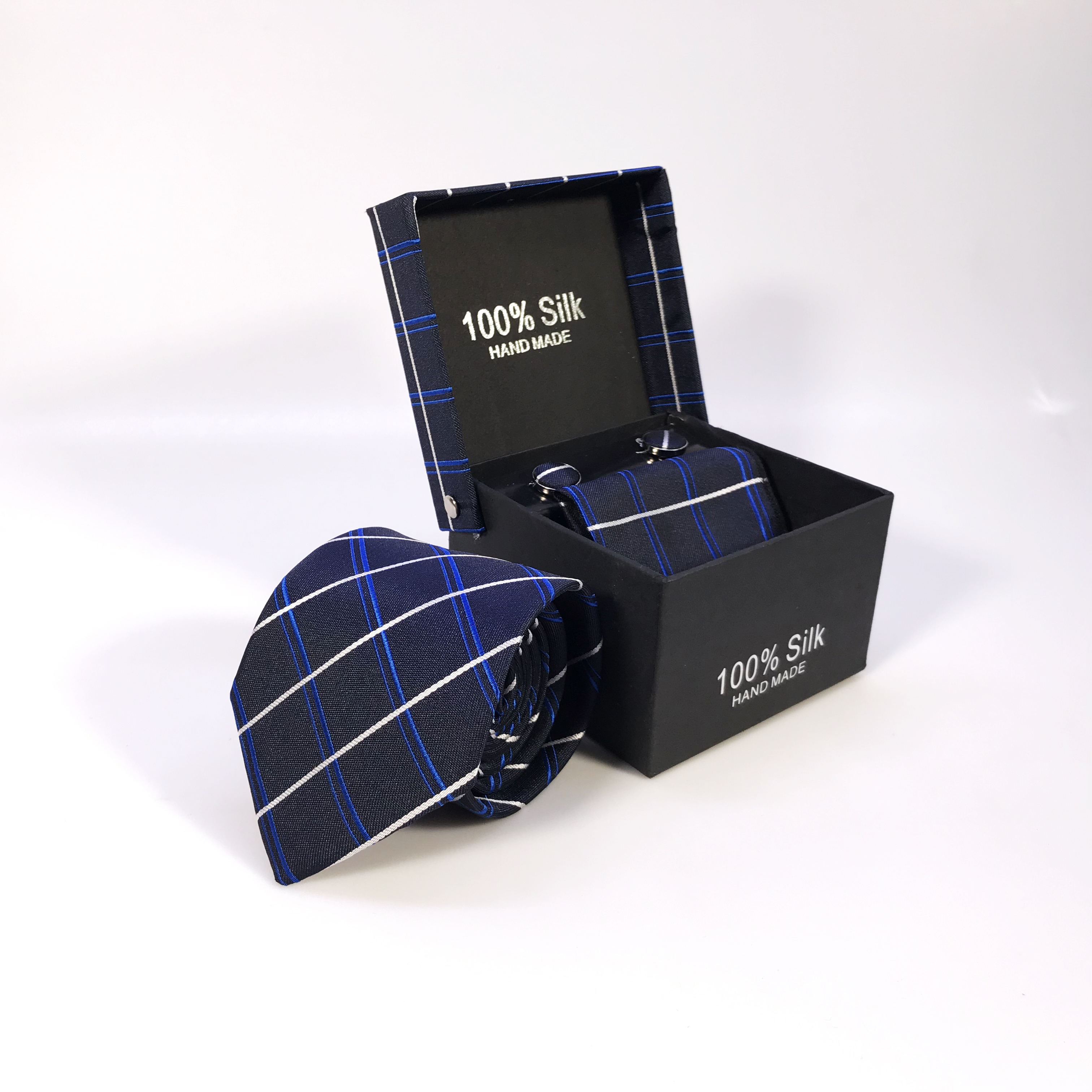 Cà vạt silk dệt mềm mại